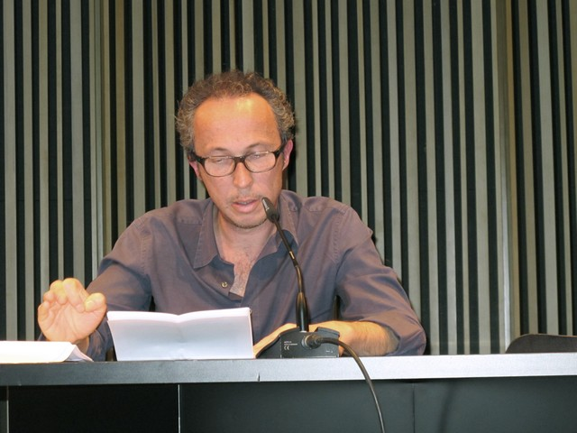 François Cusset durant el seminari de "Les derives de la teoria".5 de març de 2012